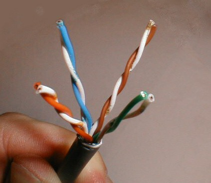 Description: Paires torsadées d'un câble réseau UTP. Source: photo prise par Christophe Jacquet en octobre 2000. © Christophe Jacquet, 2000. Licence